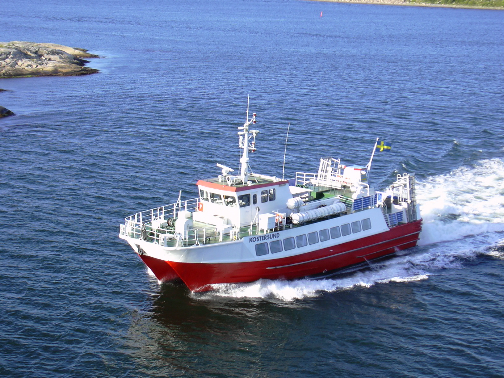 Kostersund utanför Stömstad